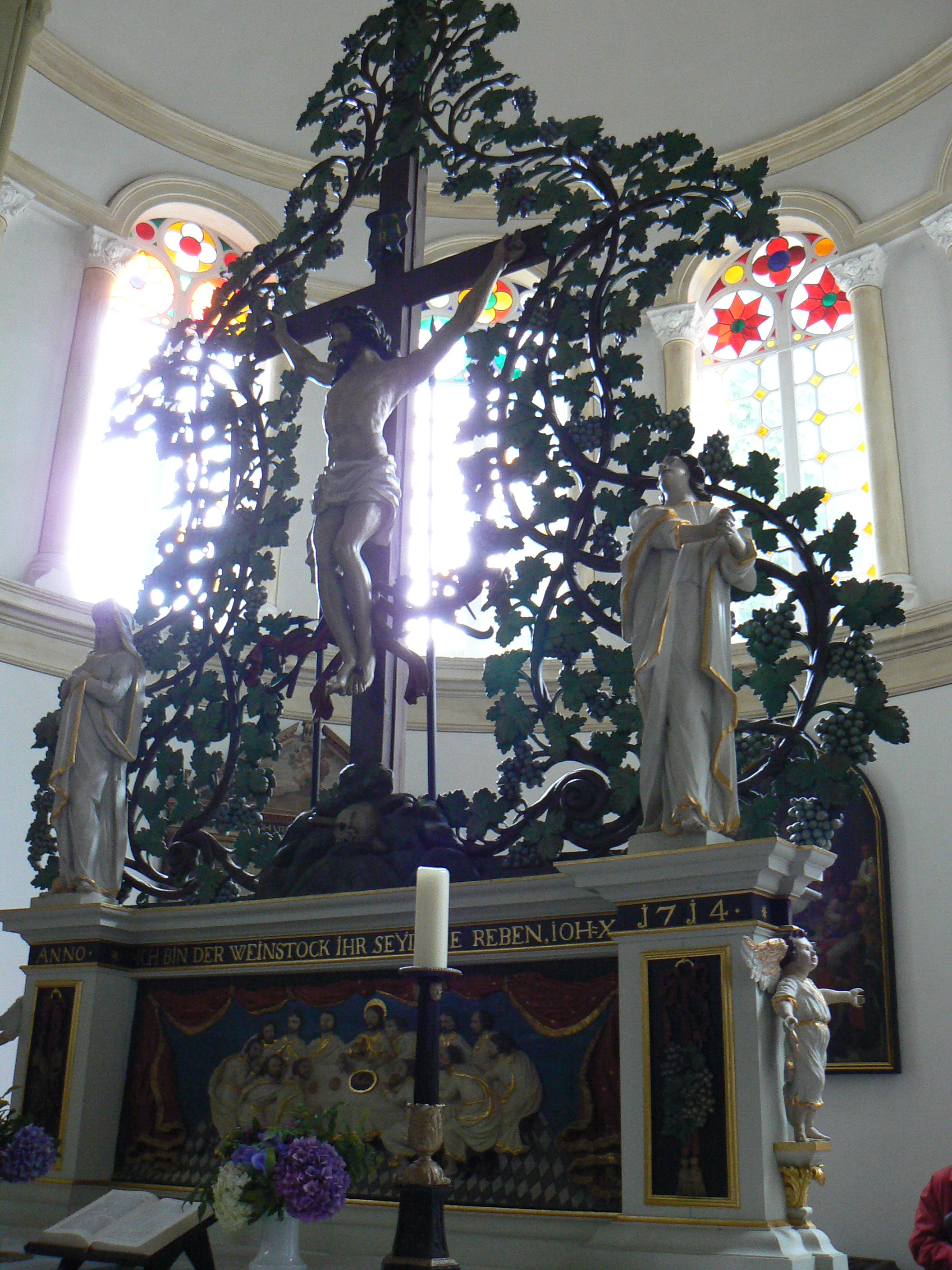 Altaraufsatz St.-Magnus-Kirche in Esens/Germany (1714)